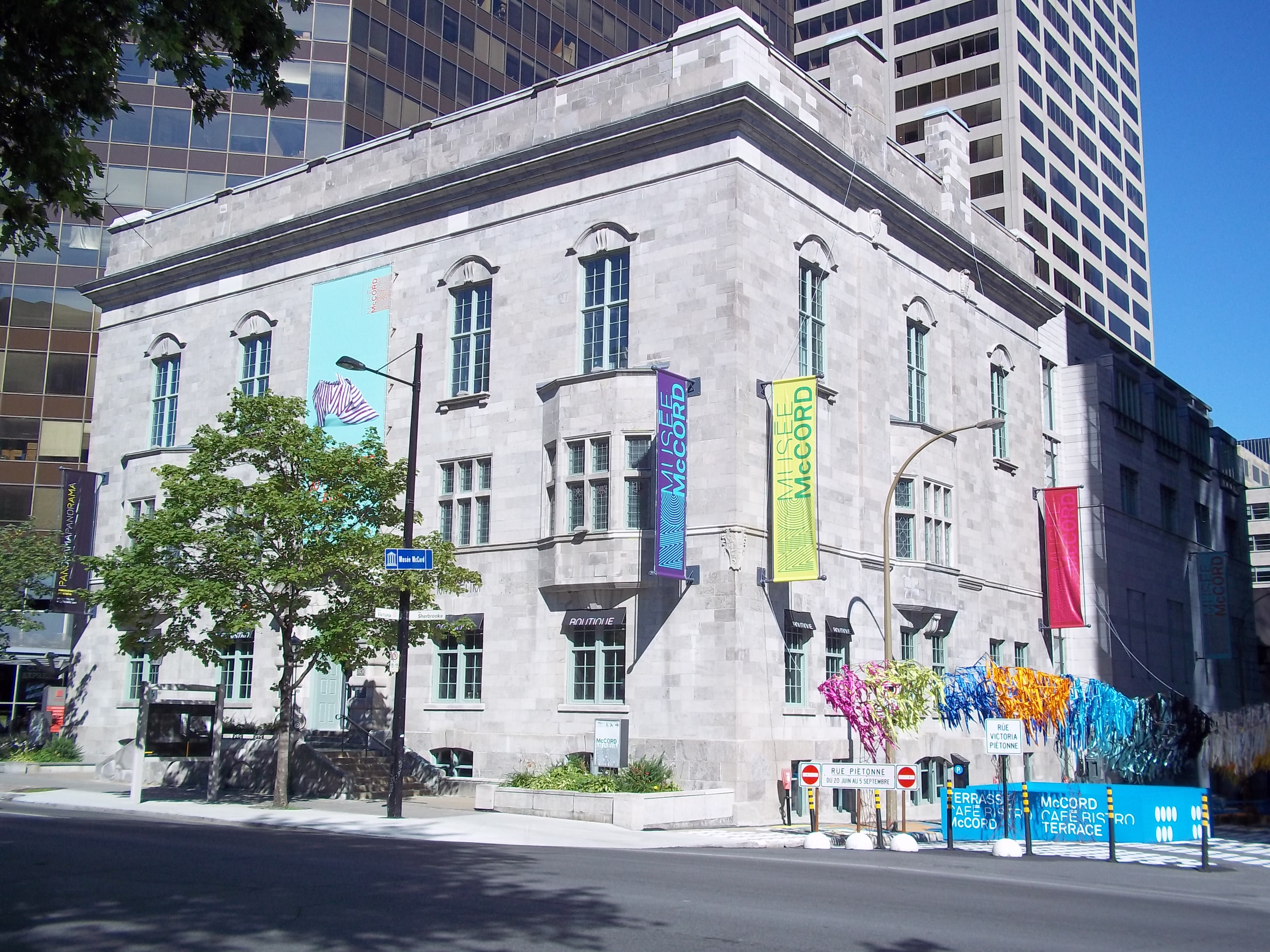 Musée McCord, 690, rue Sherbrooke Ouest, Montréal